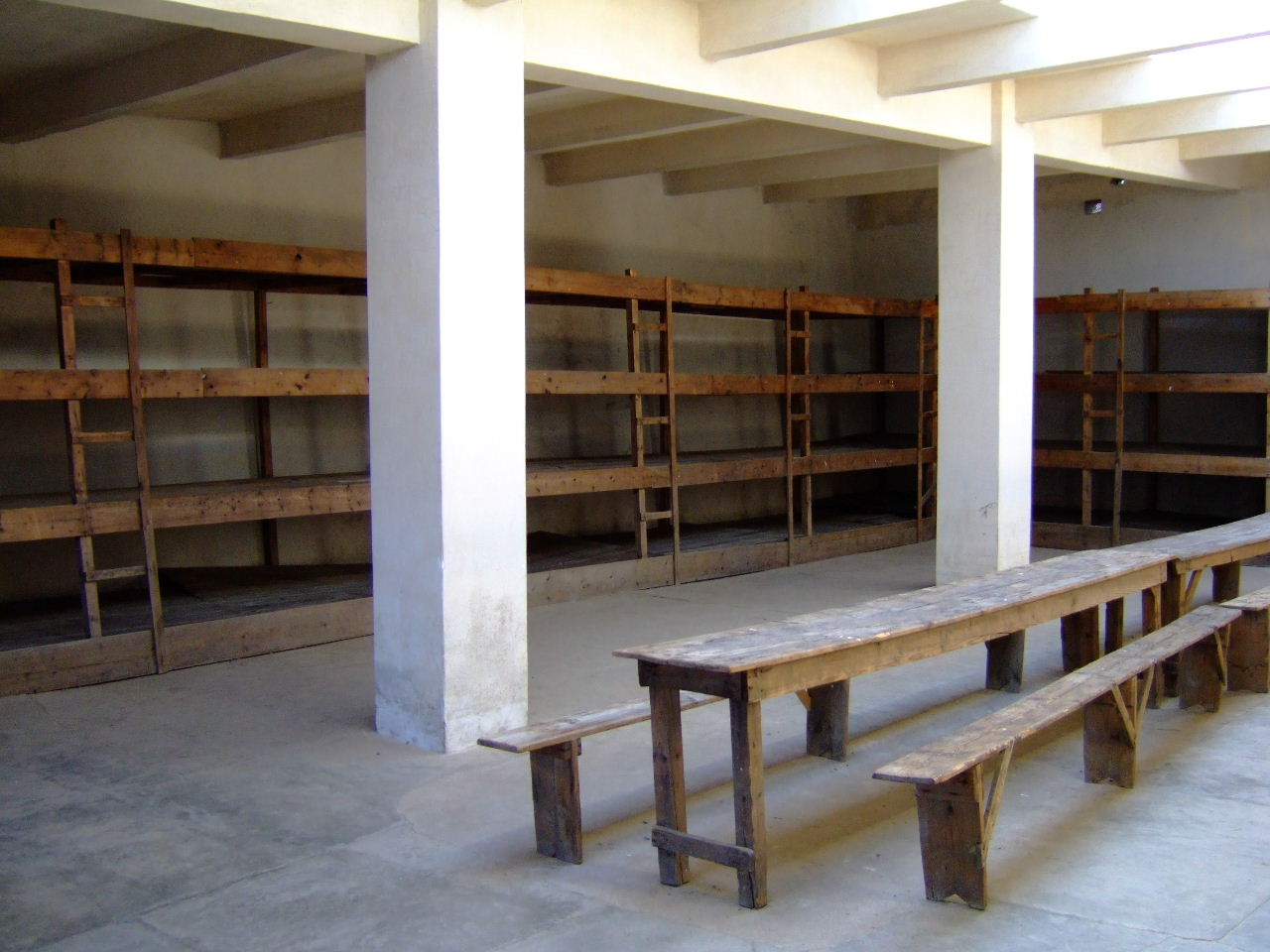 Gemeinschaftszelle im Hof IV der Kleinen Festung in Theresienstadt Aufnahme: 1. Juli 2006 Url